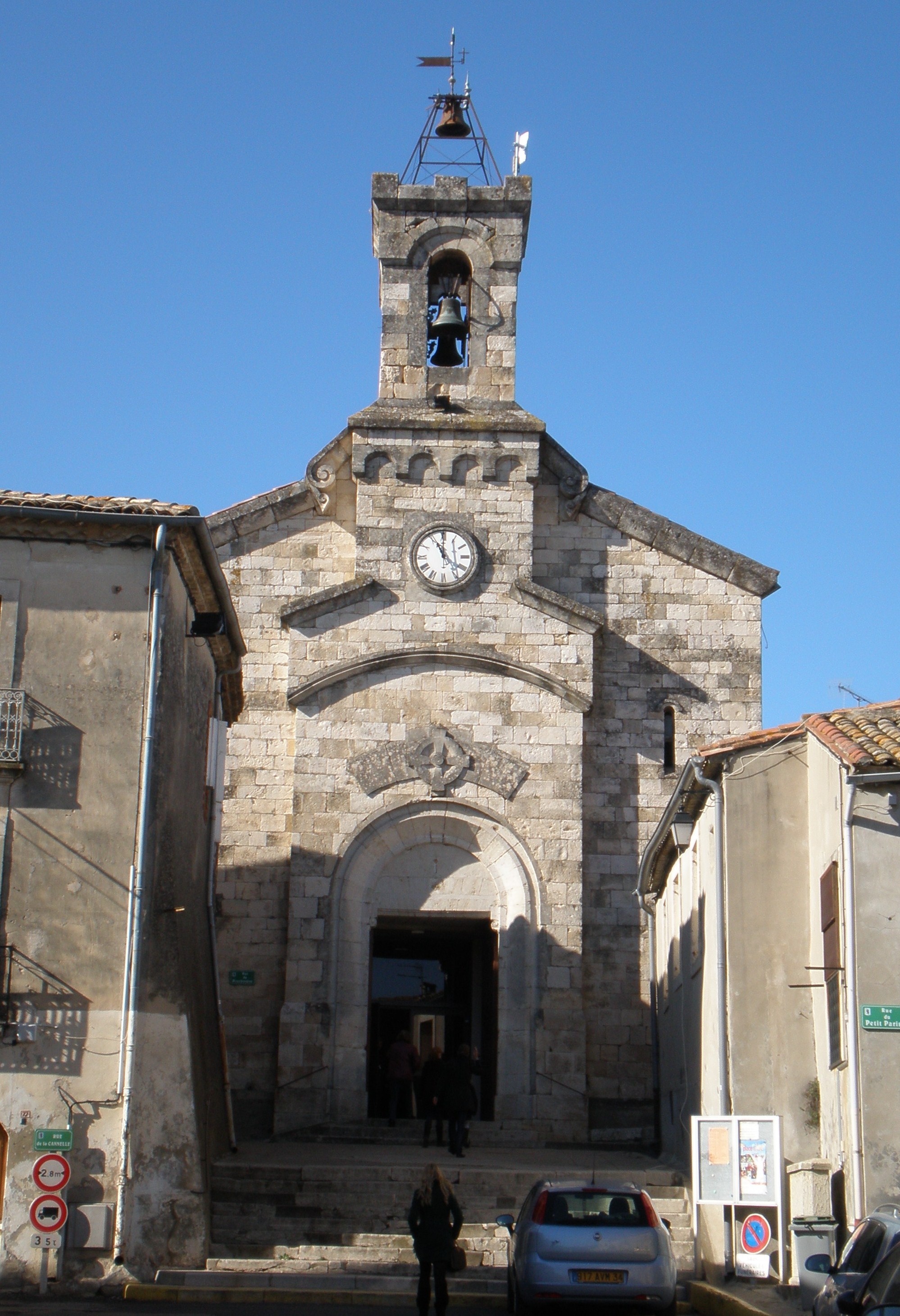 Église Saint-Gély de Saint-Gély-du-Fesc (Hérault, France)